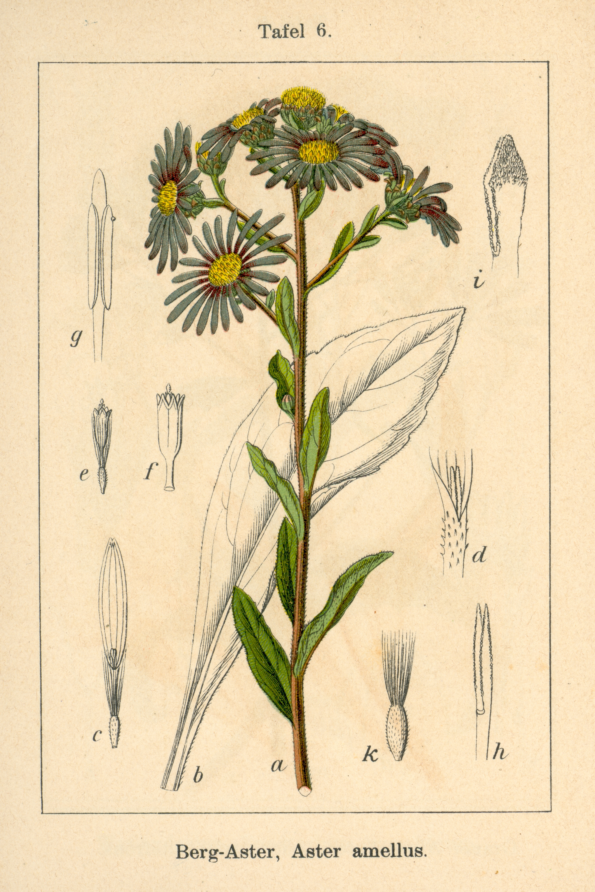 Aster amellus L. Original Caption Berg-Aster, Aster amellus